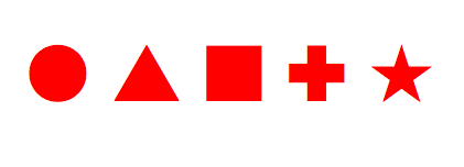 Flächentargets